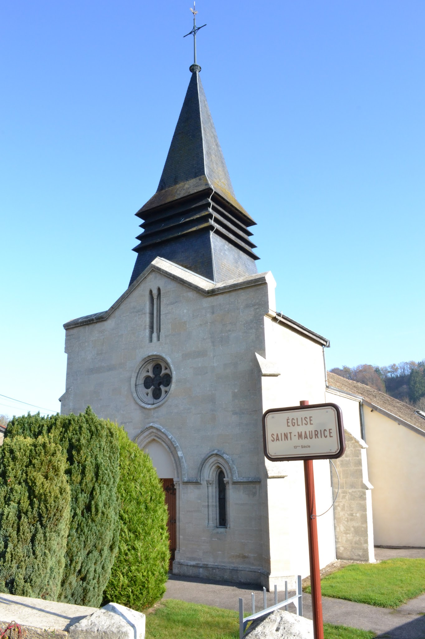 Eglise Saint Maurice à Sailly(52)